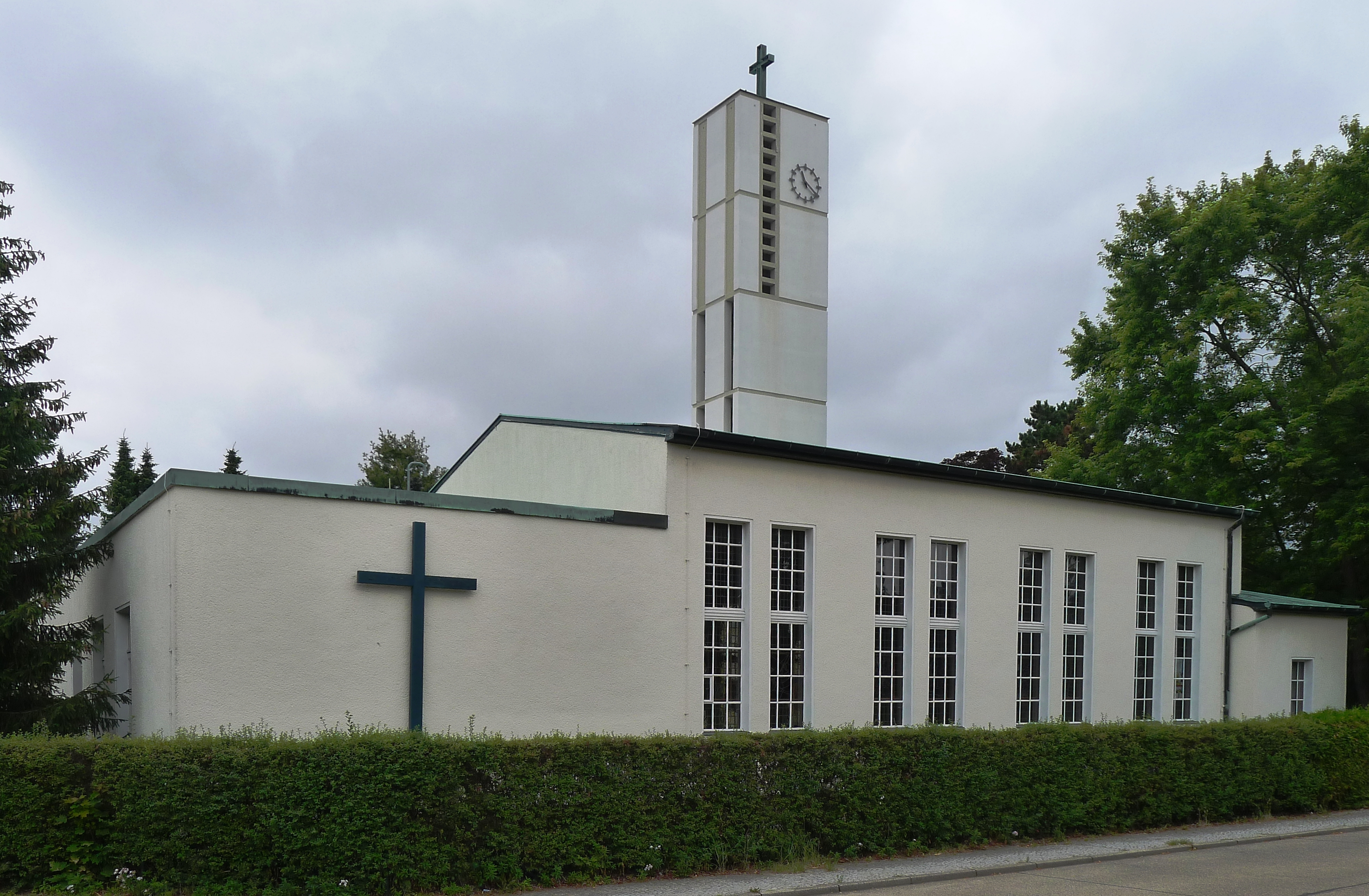 Blick auf Gemeindesaal, Kirche und Turm